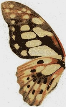 Papilio cyrnus Bsd. = Graphium cyrnus (Boisduval, 1836), underwing